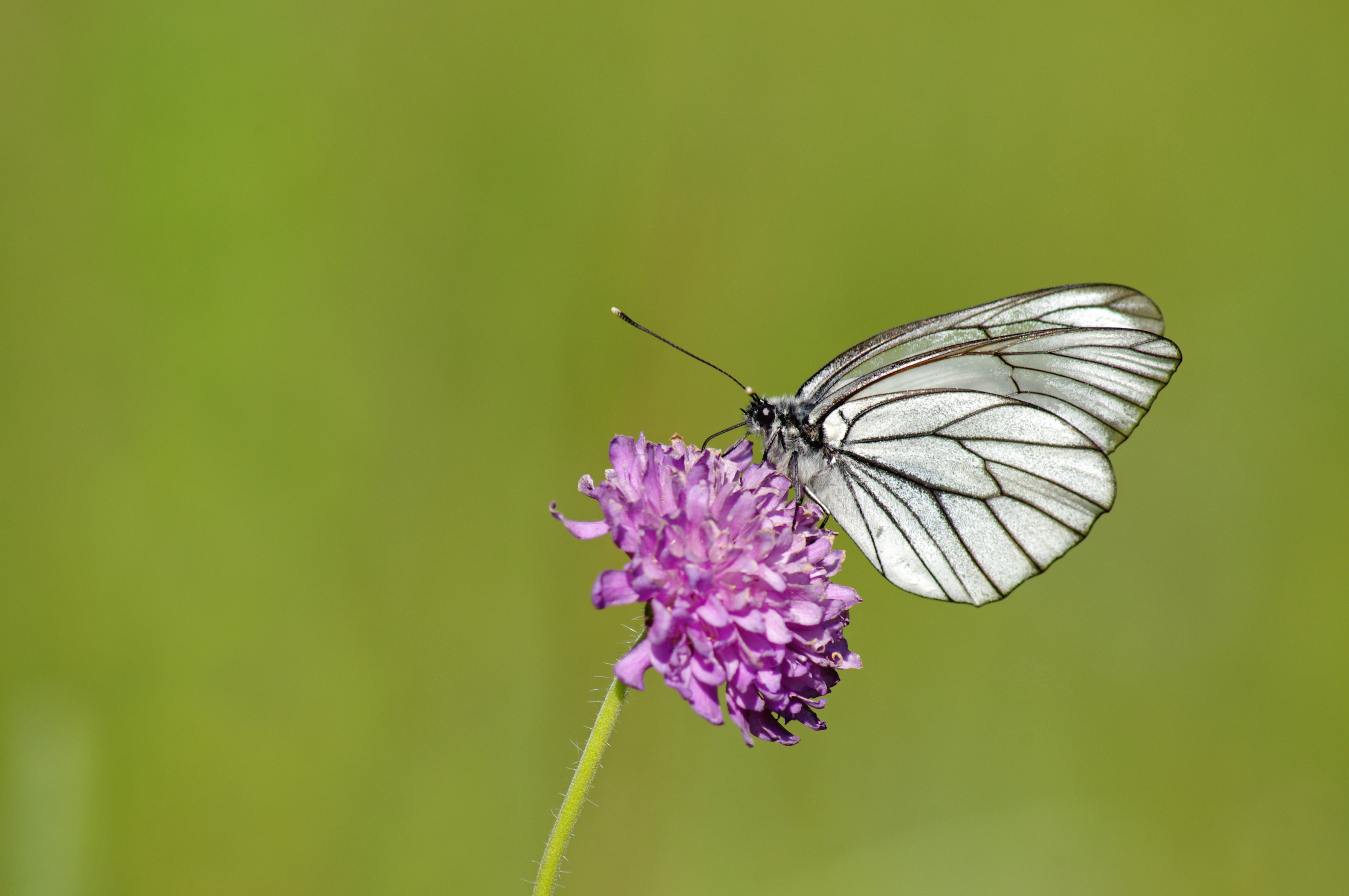 Põualiblikas äiatariõiel Saaremaal Viidumäel 26. juunil 2011